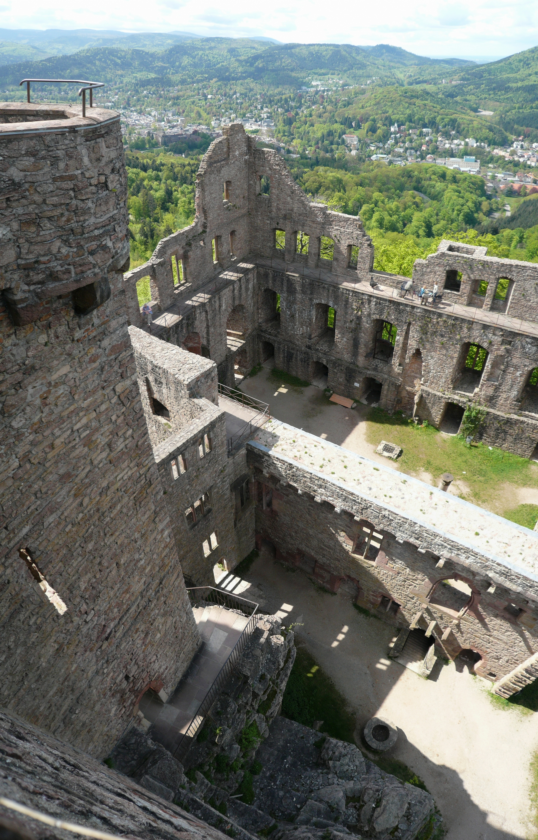 Castle Hohenbaden near Baden Baden